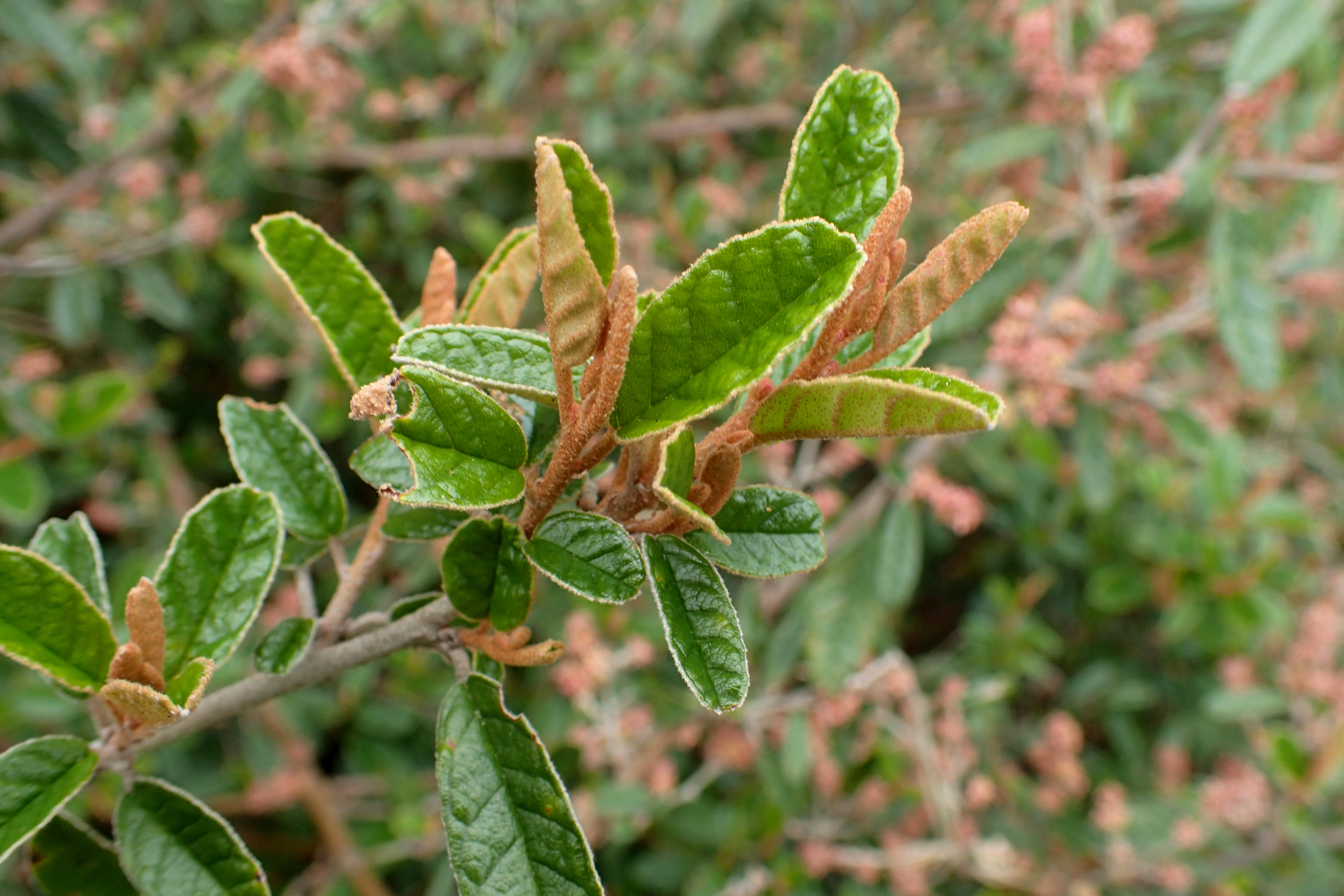 Pomaderris paniculosa var. novae-zelandiae in Auckland Botanic Gardens